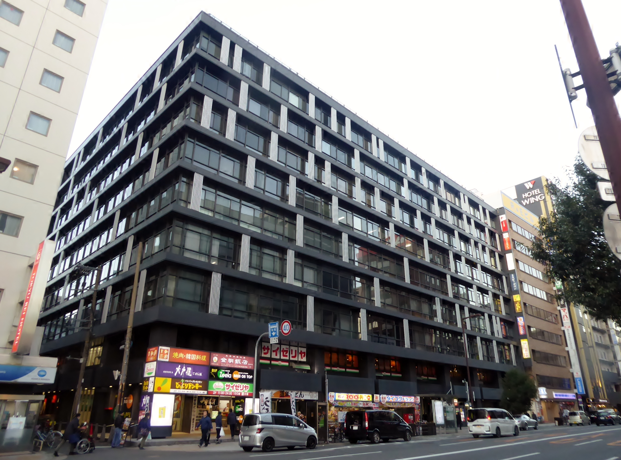 日本生命梅田第二ビルを撮影。